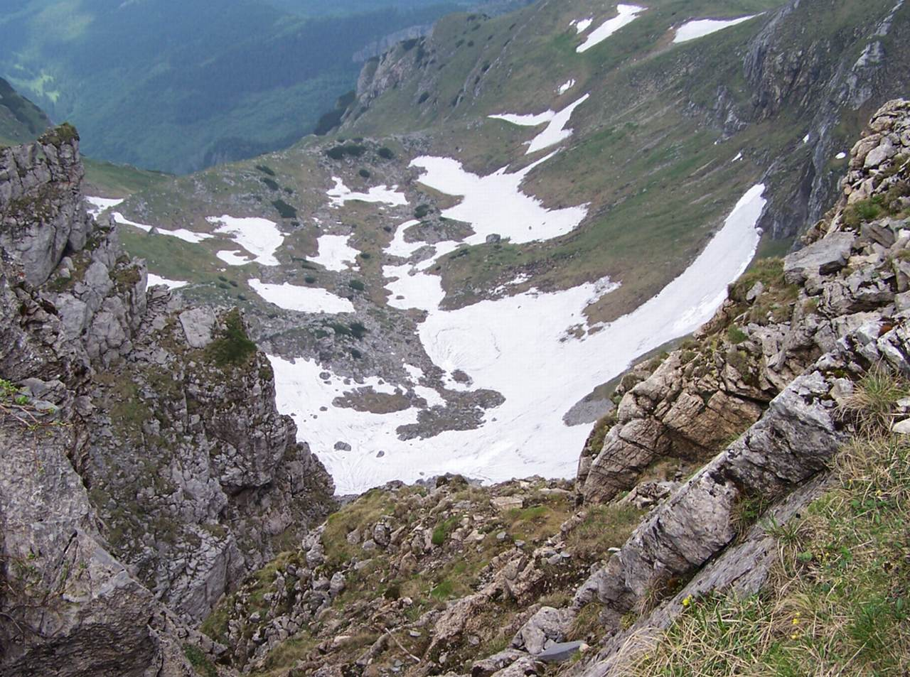 Dolina Mułowa polska